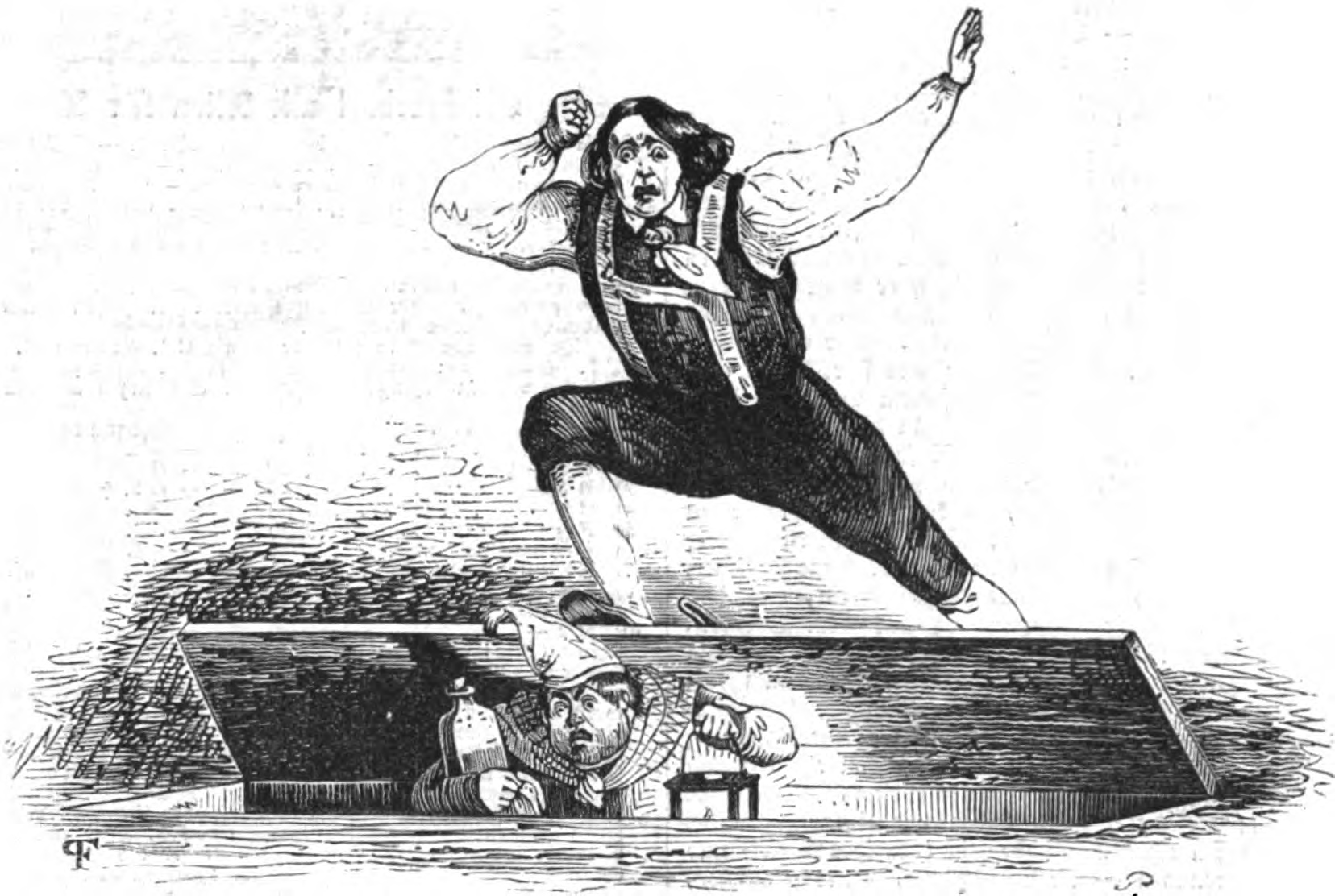 Szene aus dem 3. Akt des Stücks "Der Zerrissene" von J. N. Nestroy, 1844.